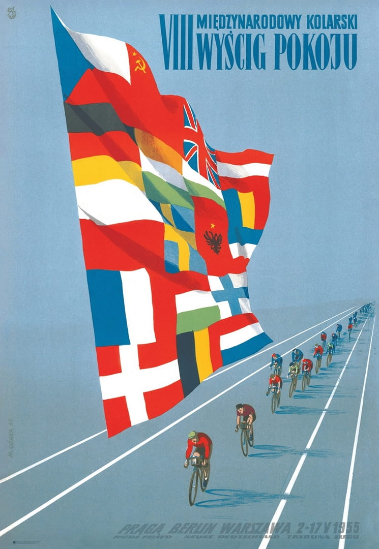 Plakat, VIII. Internationalen Radfernfahrt für den Frieden 1955 Zentralbild CAF-V 21.4.1955 - Vor der Internationalen Friedensfahrt (Polen) - Für die Teilnehmer der VIII. Internationalen Radfernfahrt für den Frieden Prag-Berlin-Warschau werden von den Studenten im 5. Studienjahr an der Staatlichen Kunsthochschule in Sopot Halstücher entworfen. W. Gorka entwarf ein Plakat für die Friedensfahrt. UBz: Das Plakat der VIII. Internationalen Radfernfahrt für den Frieden Prag-Berlin-Warschau vom 2. - 17.5.1955, ein Entwurf von W. Gorka.